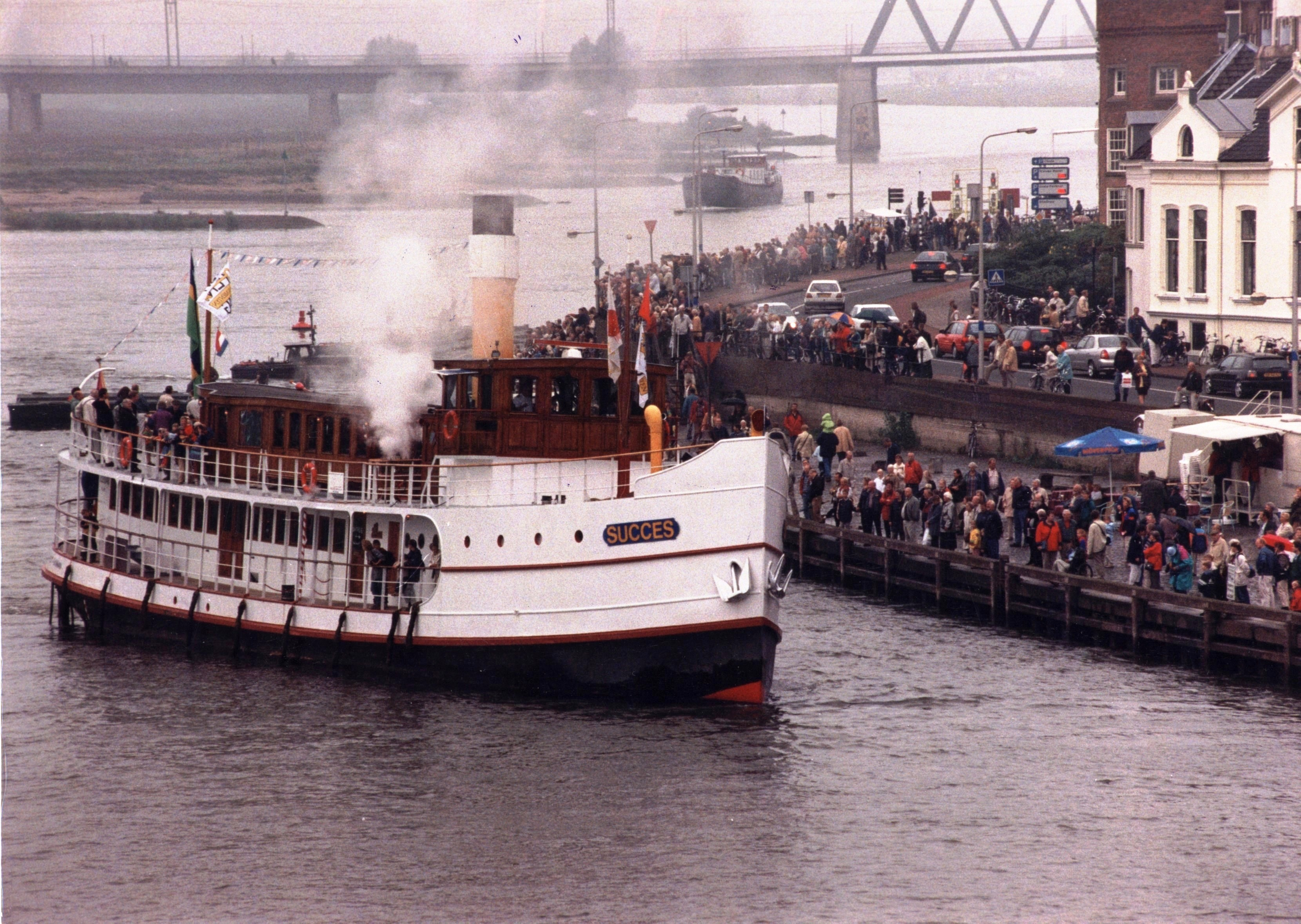 Een attractie